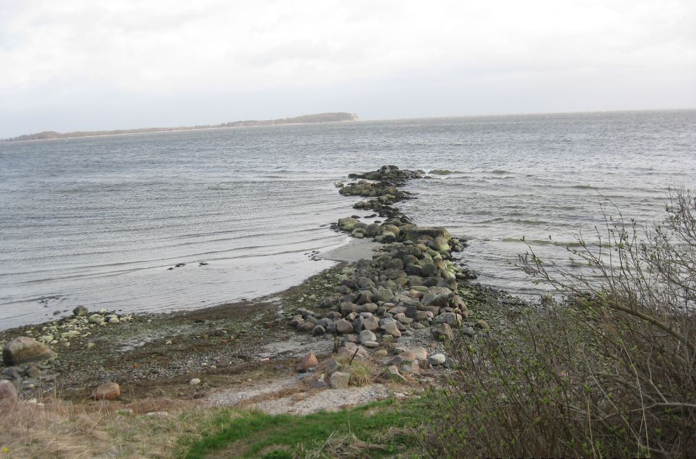 Neuendorf. Reste der ehemaligen Landungsbrücke, Blick nach Süden